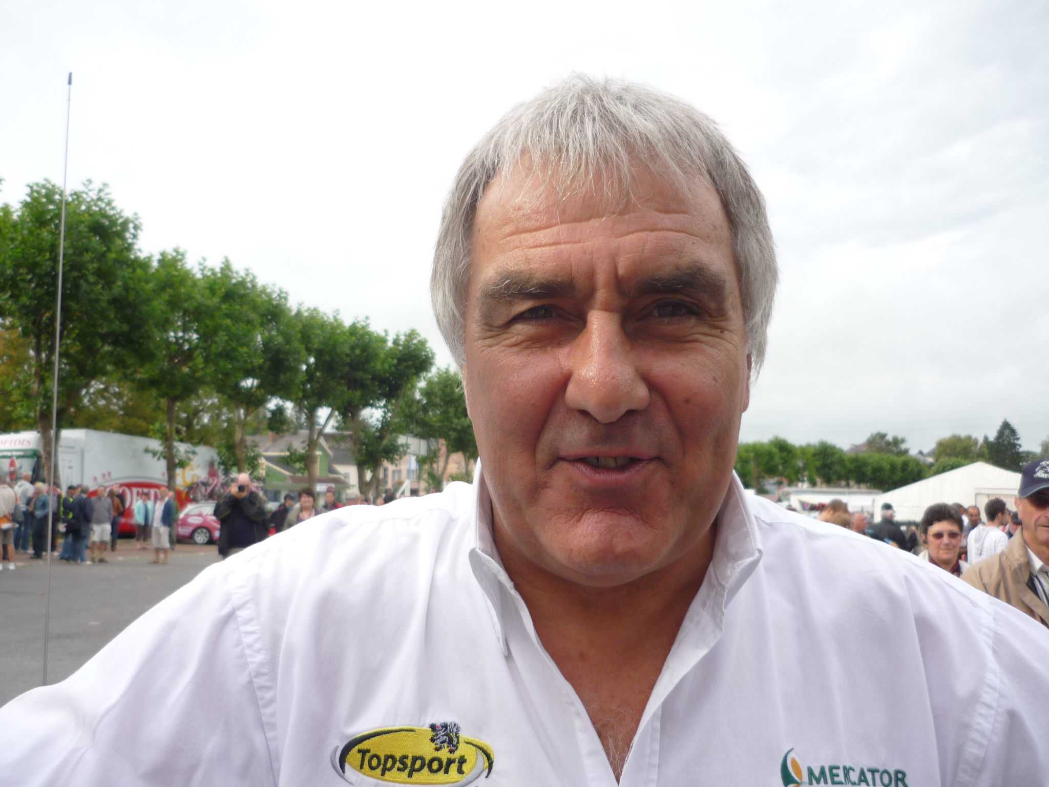 lors d une course. tour du luxembourg 2012